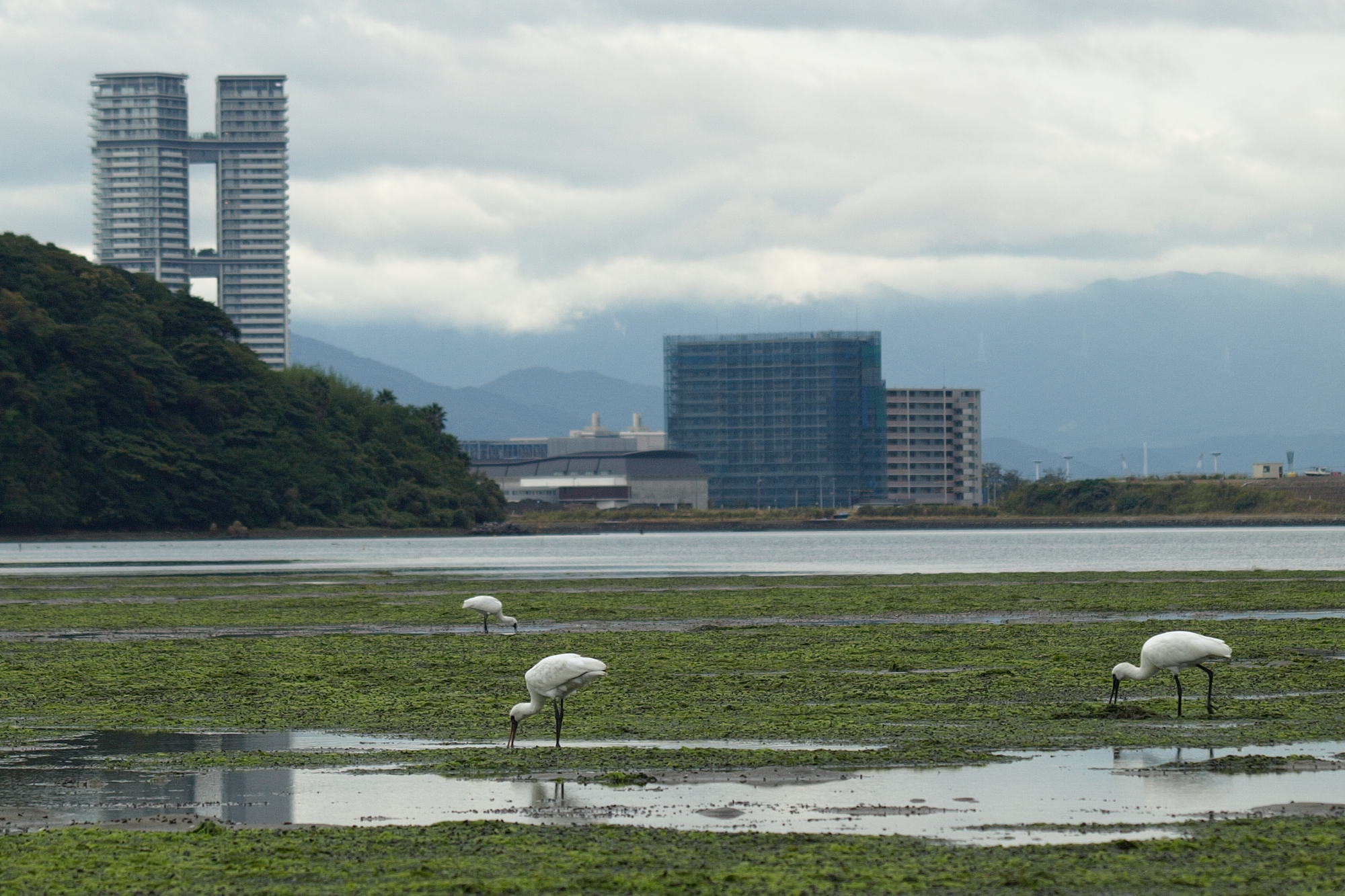 福岡県にある和白干潟。アオサが大量発生している。白い鳥はクロツラヘラサギ。